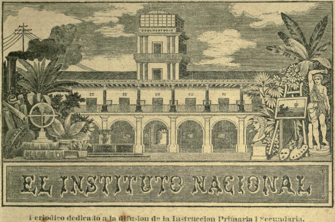 Logo del periódico El Instituto Nacional, del Instituto Central para Varones de Guatemala